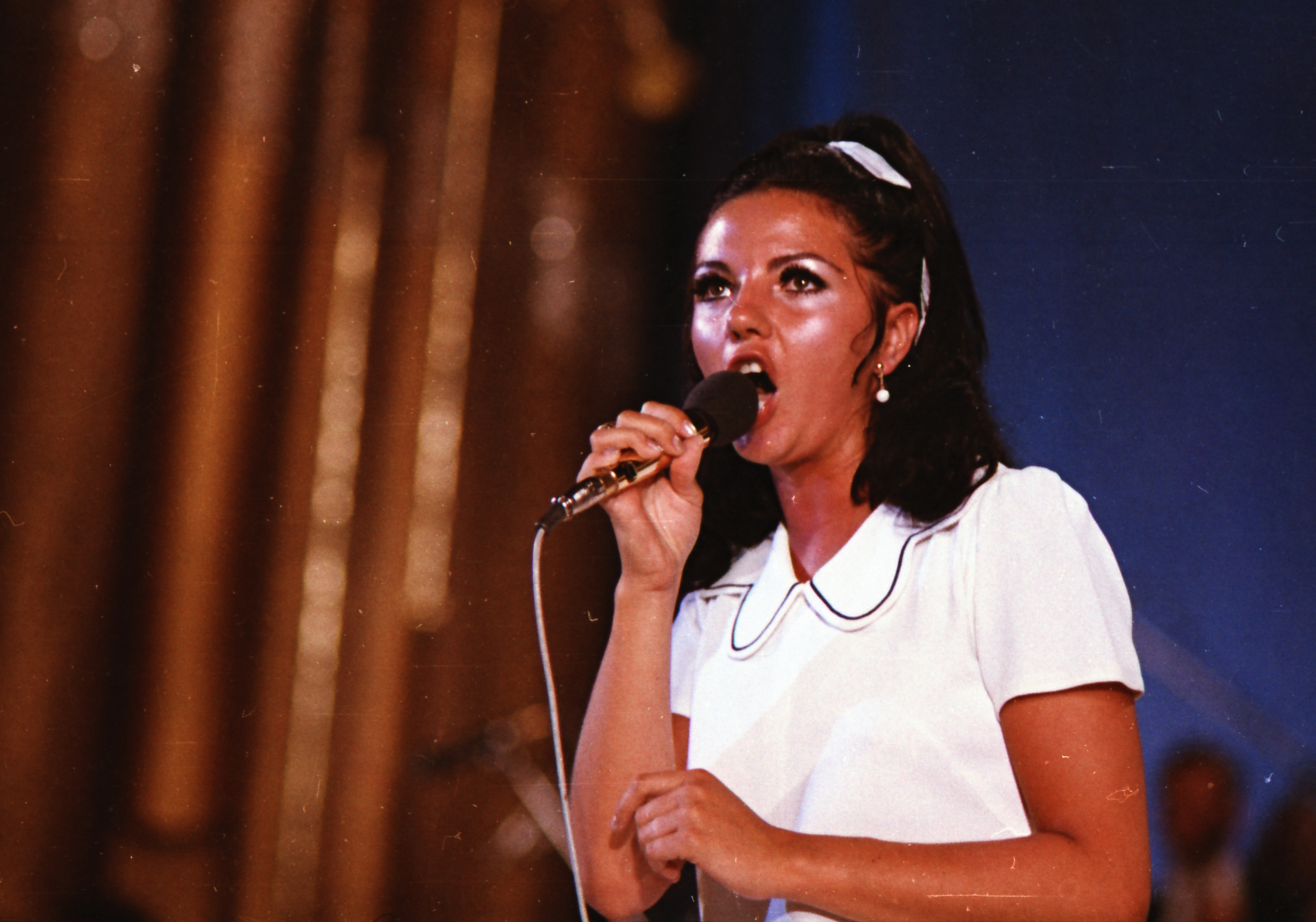 Zalatnay Sarolta magyar énekesnő.